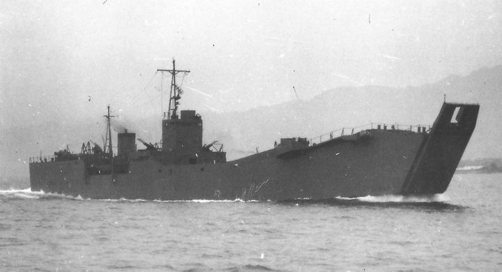 公試中の第百一号特設輸送艦、大阪湾